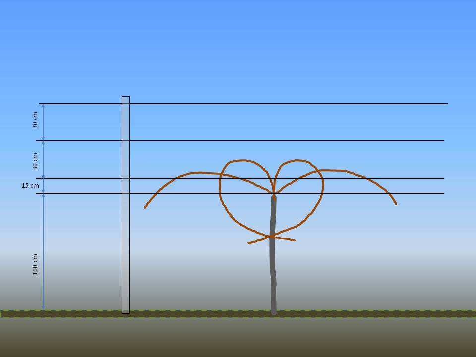 Spaliererziheung mit Halbbogen- und Herzschnitt